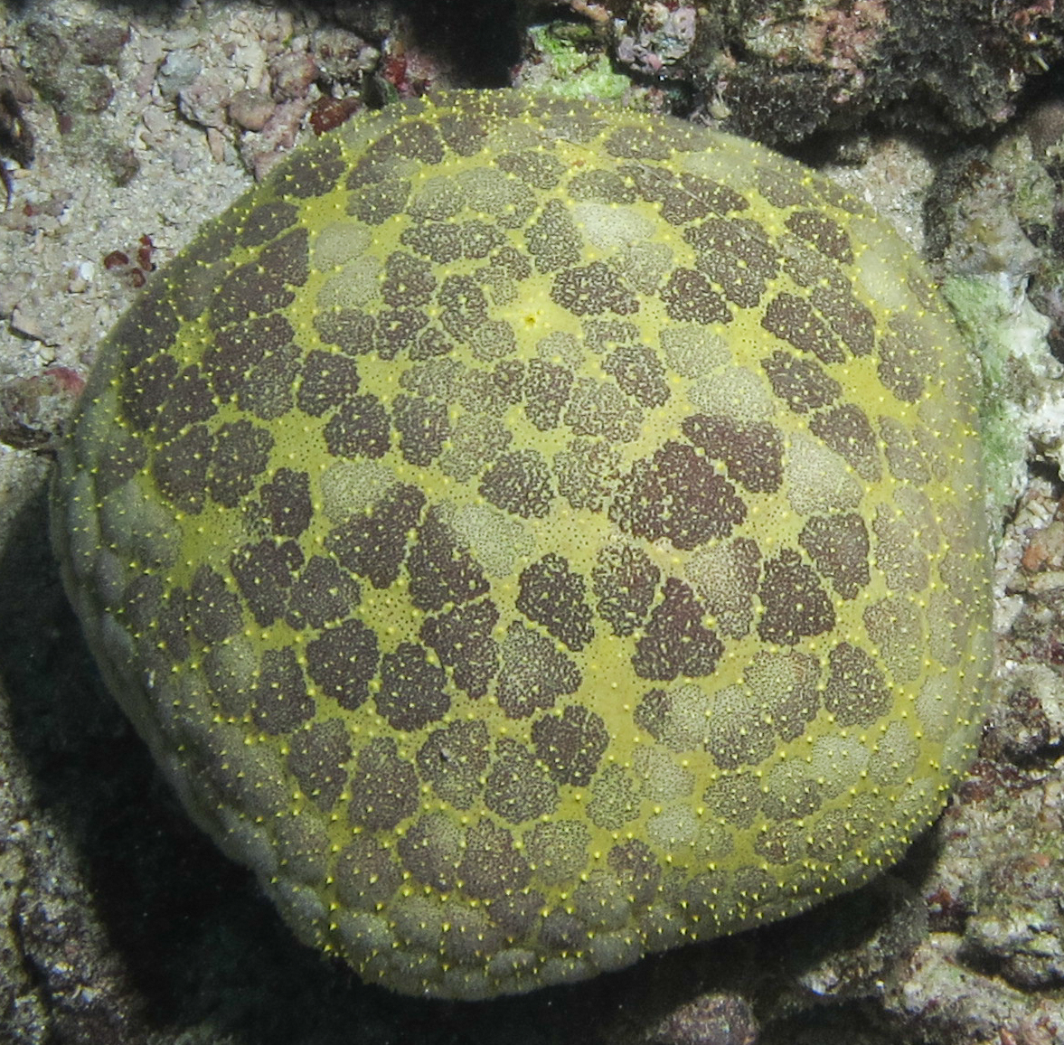 Culcita novaeguineae - Fiji